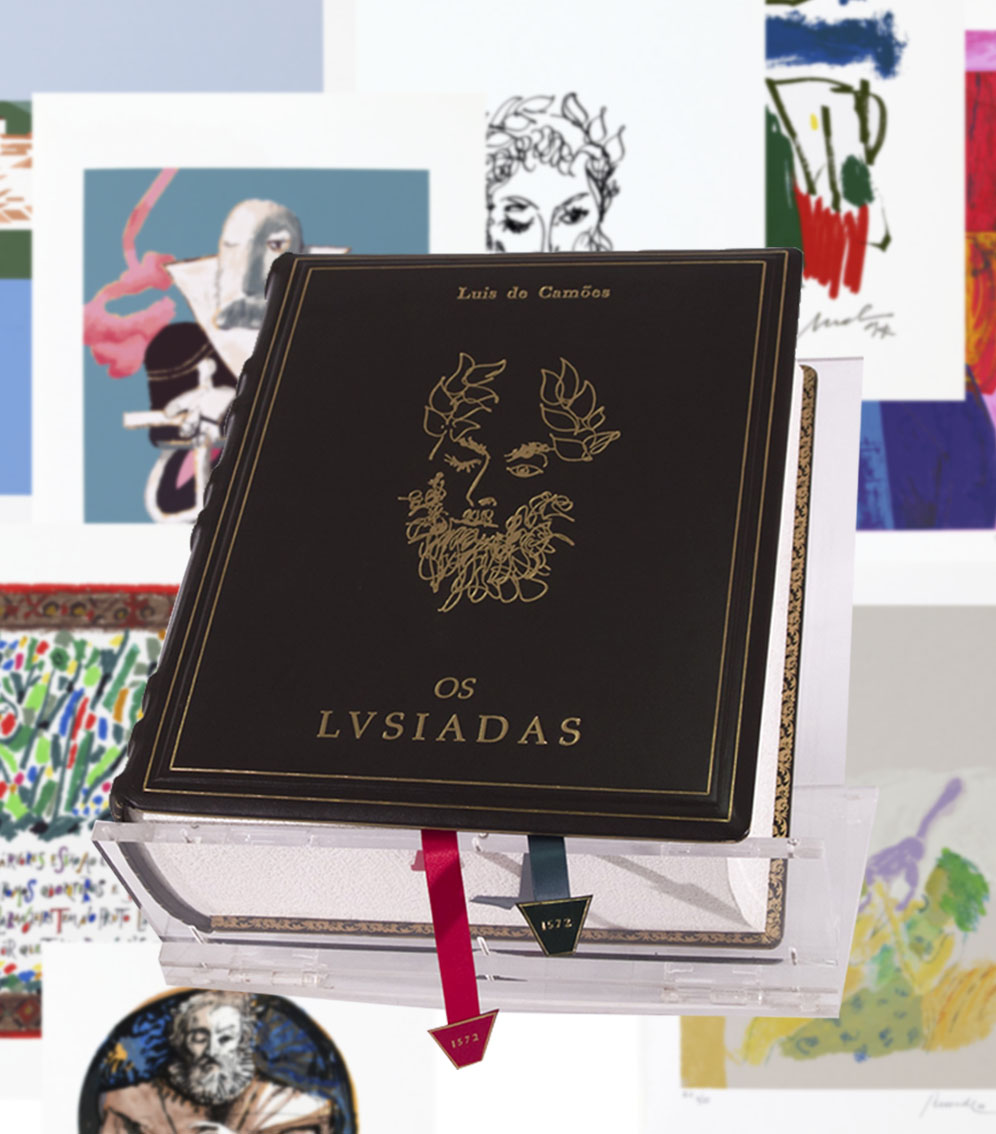 Edição do CPS Os Lusiadas